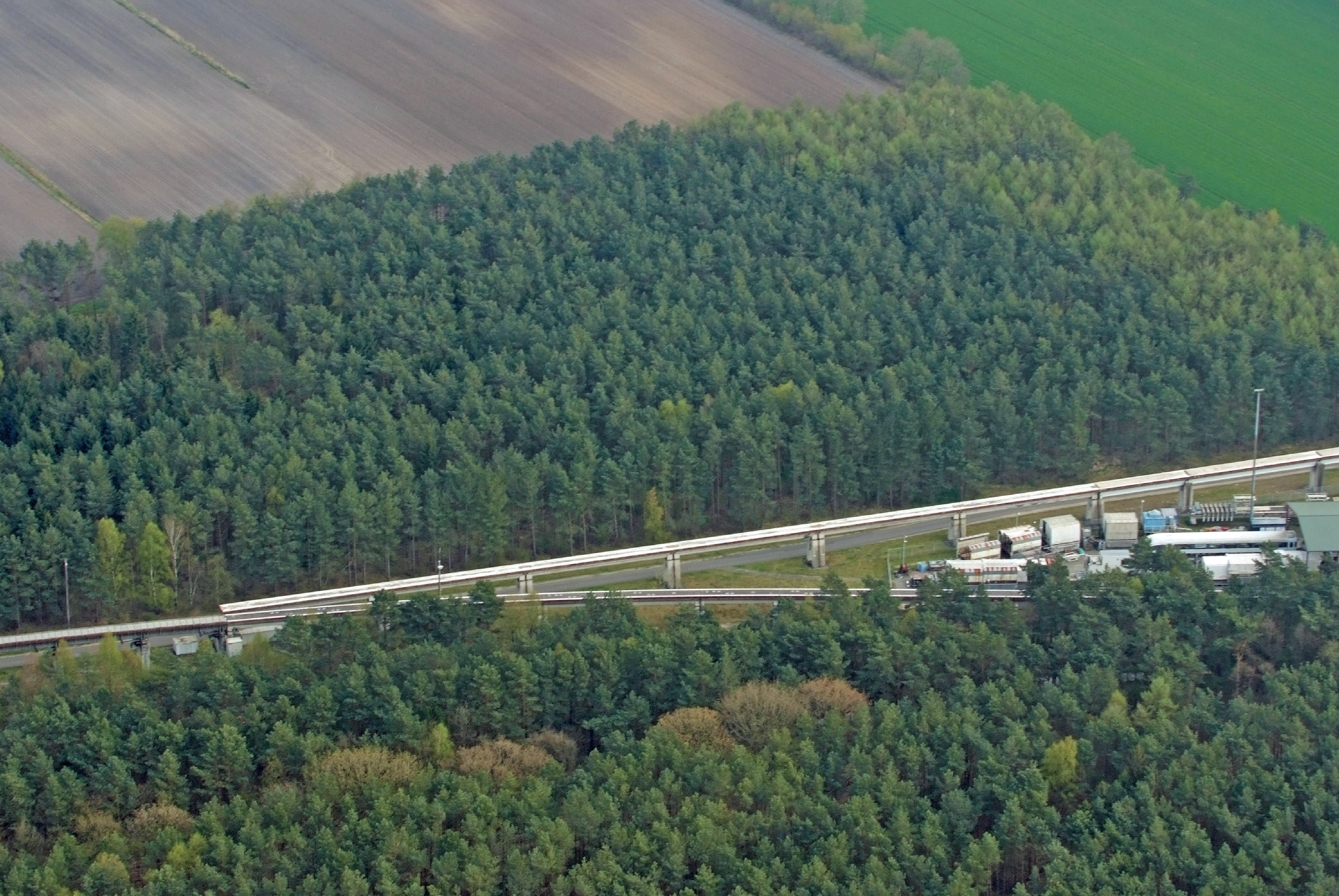 Transrapid-Versuchsanlage Emsland, Samtgemeinde Lathen / Fotoflug von Nordholz-Spieka nach Oldenburg und Papenburg